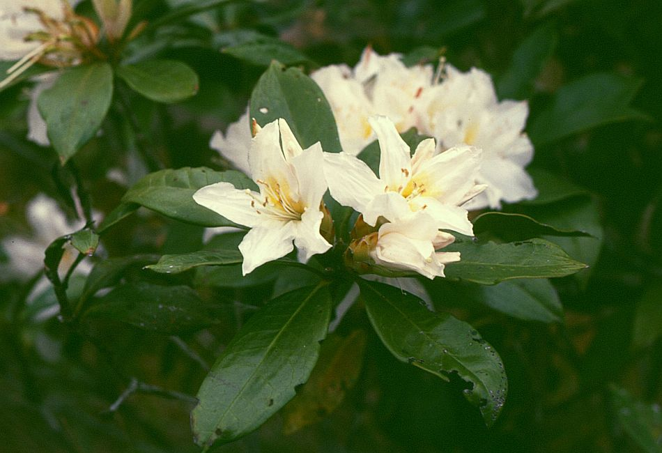 Rhododendron moulmainense, Heidekrautgewächse (Ericaceae) - Kambodscha/Cambodia, Phnom Bokor Nationalpark, zwischen "Black Palace" und Bokor Hill Station (Prov. Kampot)